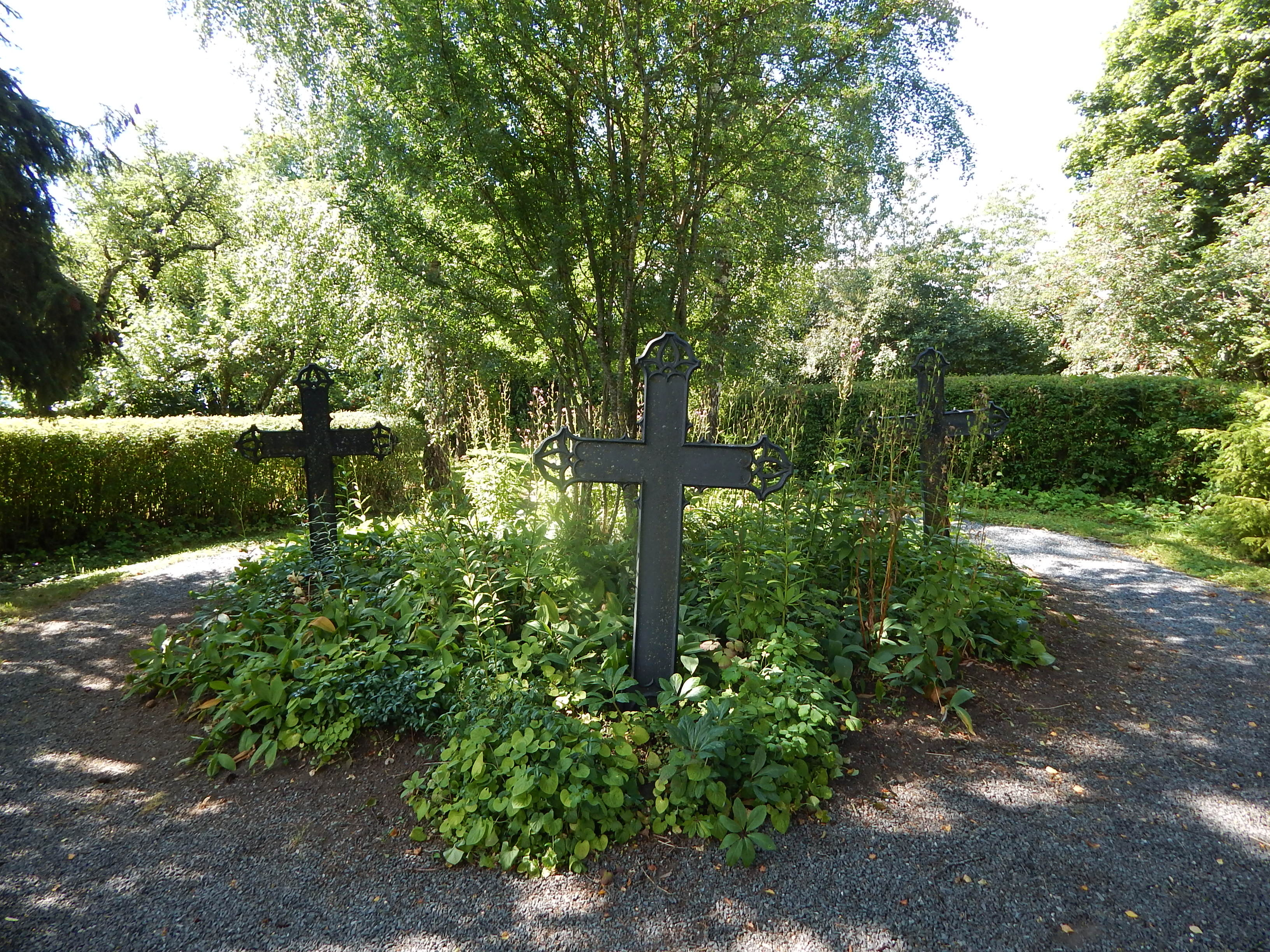 Gravmonumenter for sogneprest Wilhelm Cornisch Lassen, hans svigerdatter Frederike Christiane Krog og hennes tvillinger i Gran prestegårdshage, Granavollen